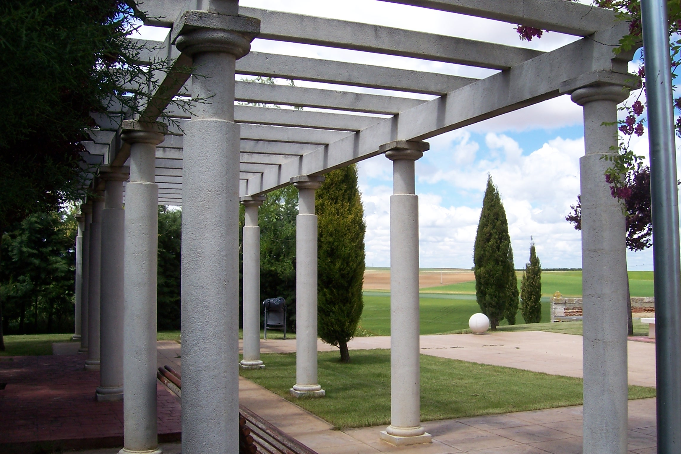 Ventosa de la Cuesta (Valladolid, España). Pérgola en la plaza de la iglesia.